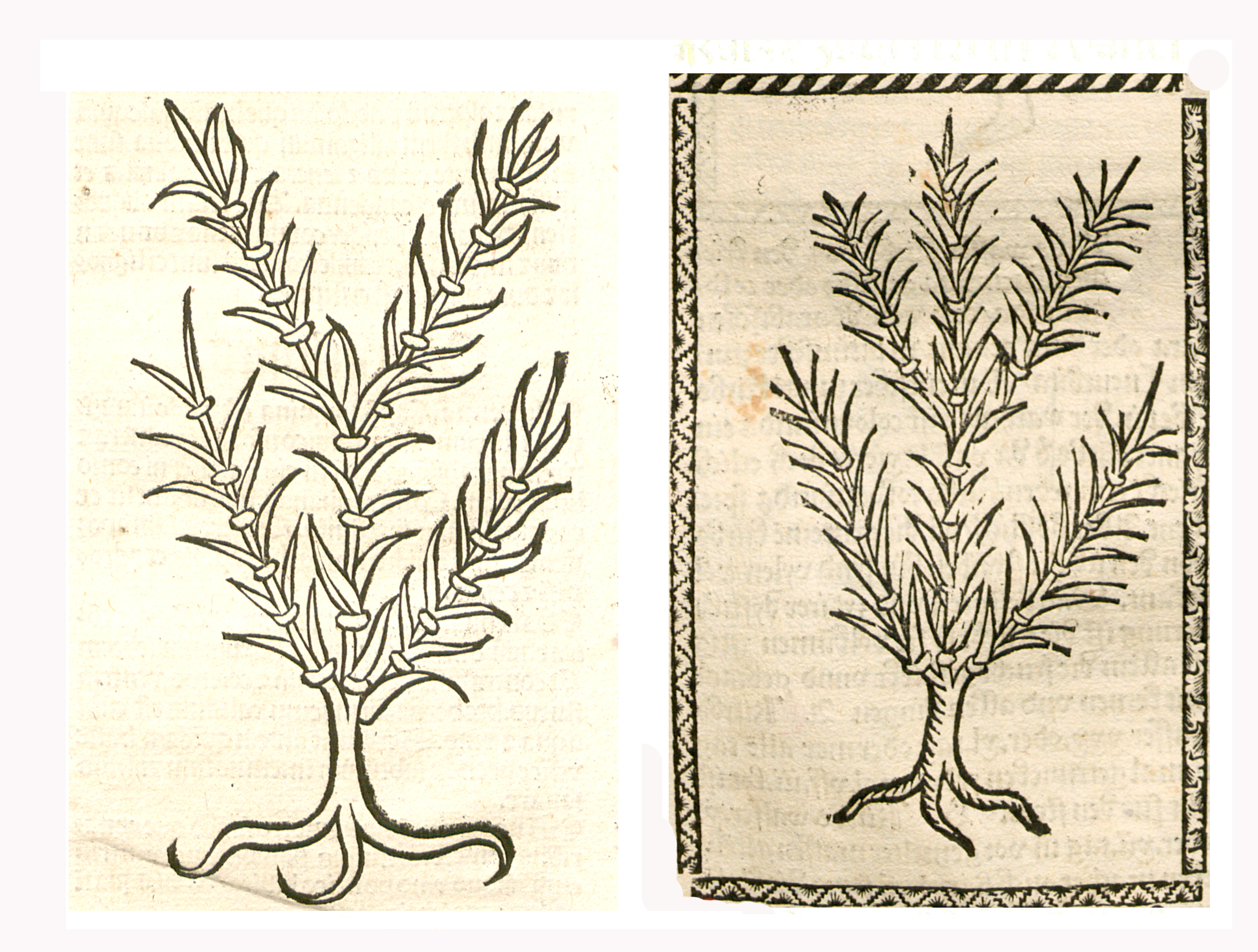 Abbildung von Katzen Zagel (Equisetum spec.)